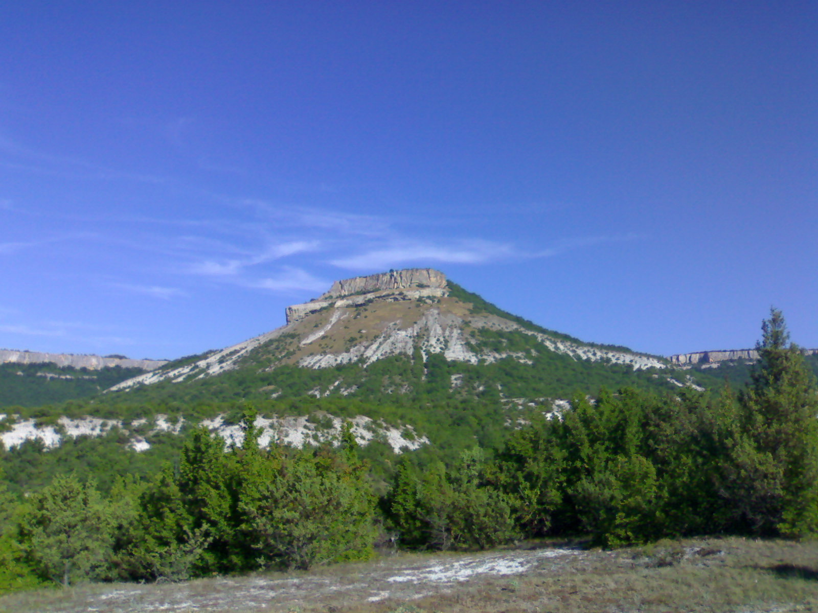 Столова гора-останець Тепе-Кермен, Бахчисарайський р-н с. Кудрино